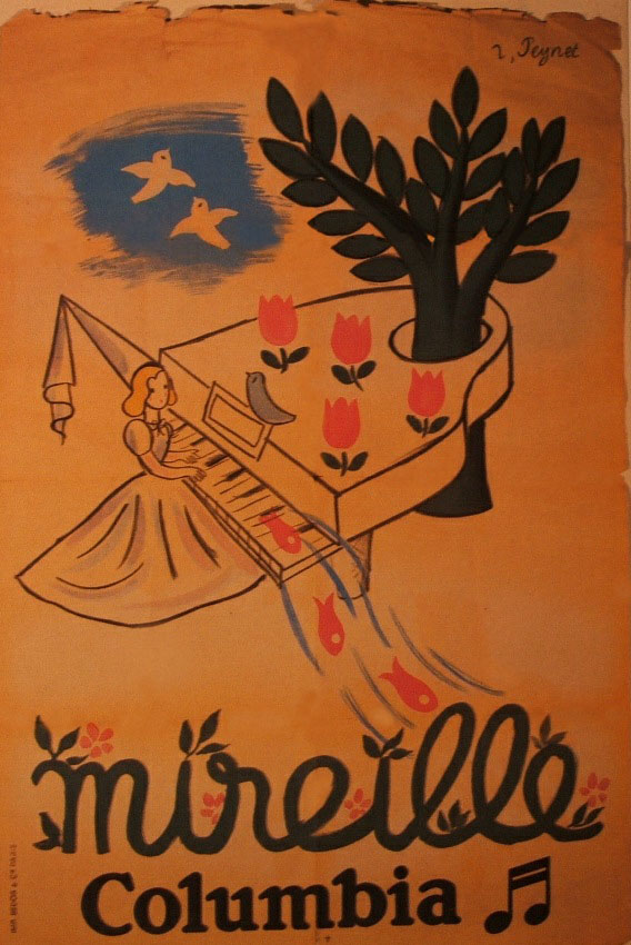 poster 1930 pour disque Columbia de la chanteuse Mireille Hartuch (1906-1996)